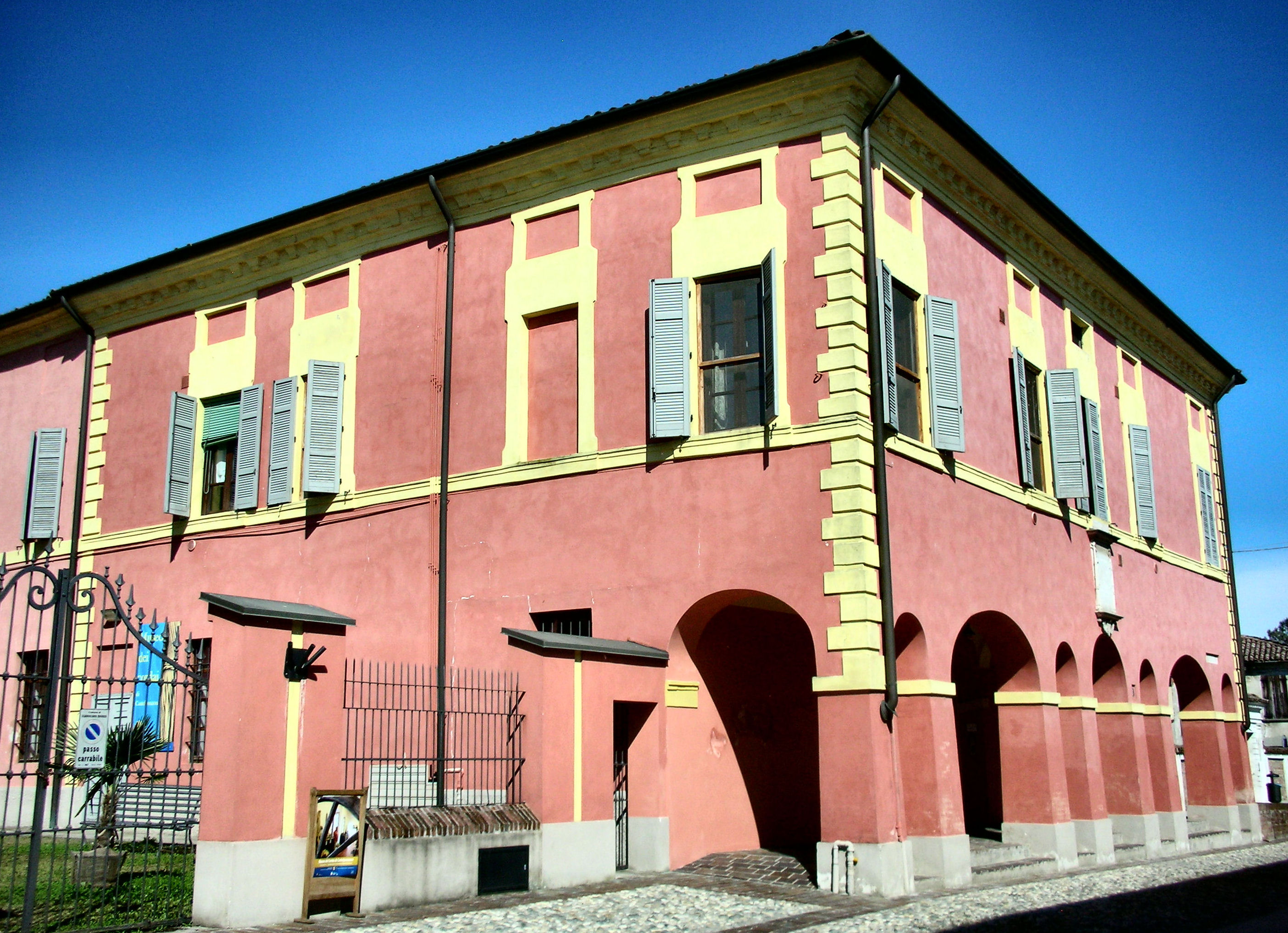 Ex-Municipio, ex-scuola elementare oggi sede del Museo dei Cordai